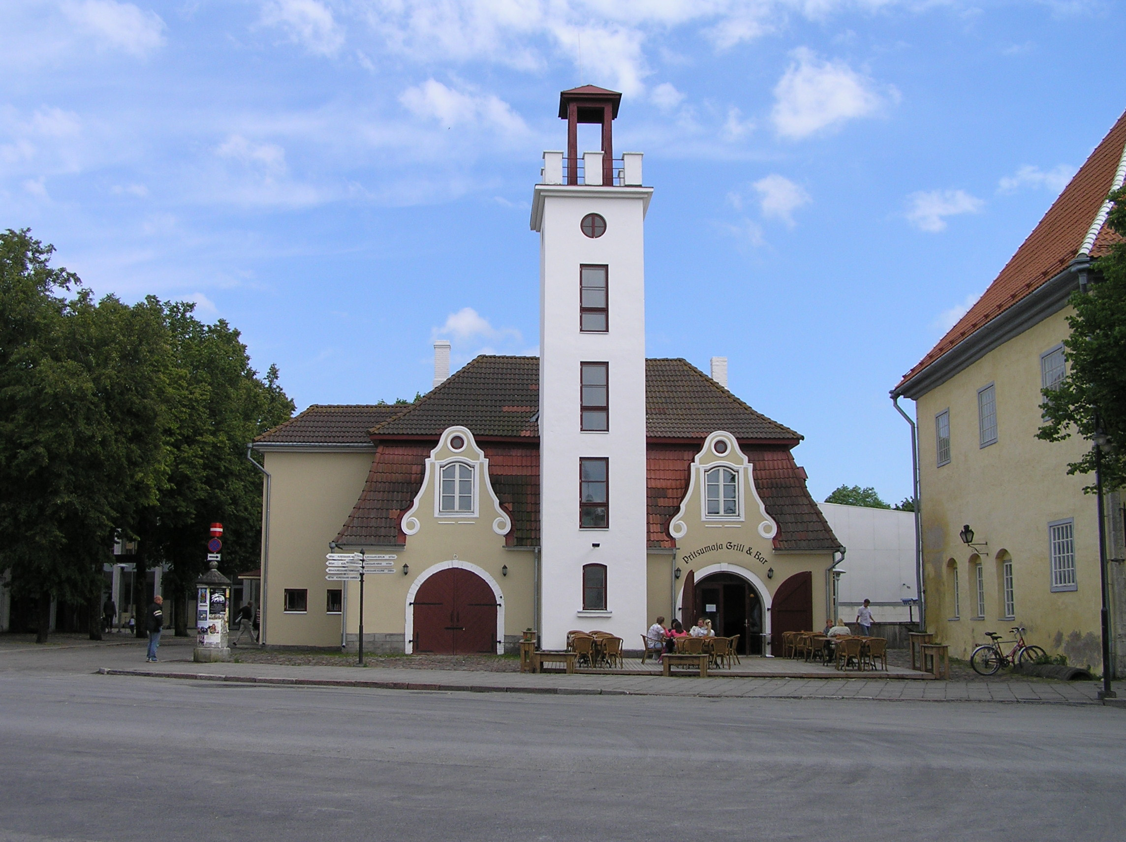 Ratusz w Kuressaare, Estonia